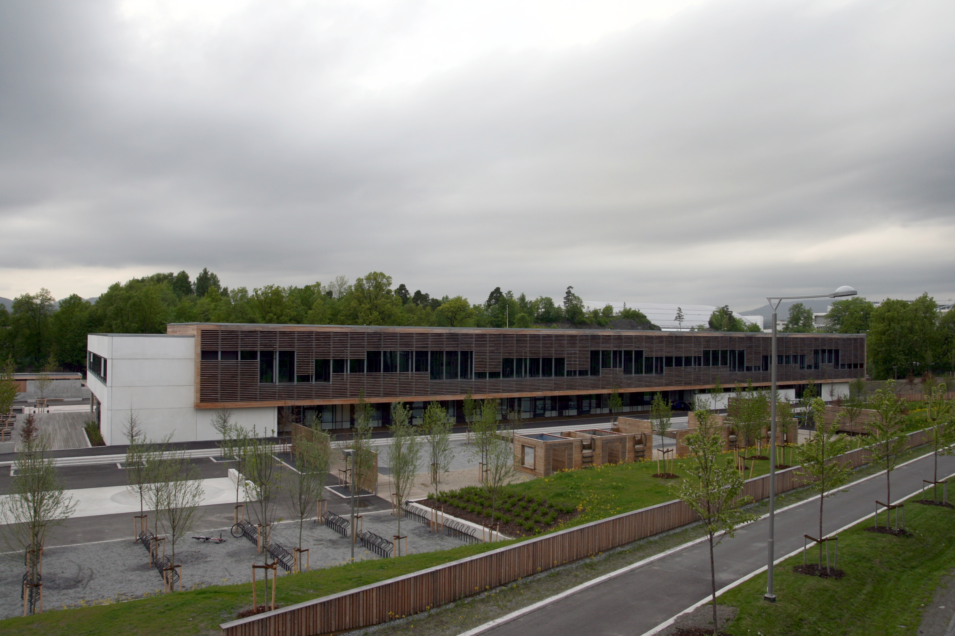 Fra Hundsund grendesenter.